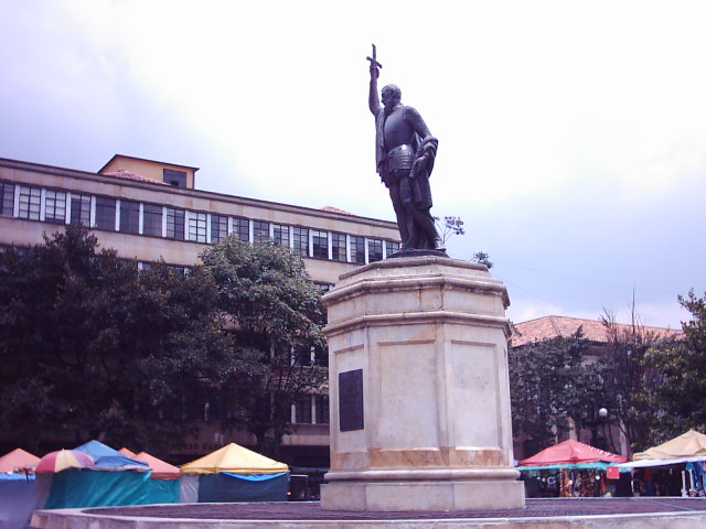 Estatua Gonzalo Jimenez Quesada, obra de Juan de Avalos del año 1960, situada en la Plazoleta de la Universidad del Rosario (Bogotá, Colombia)